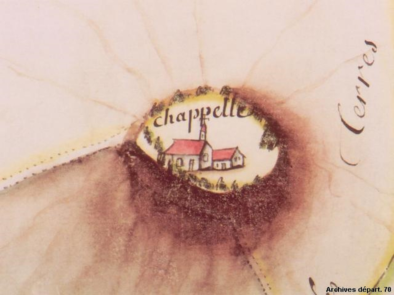 La colline de Bourlémont et la chapelle Notre-dame-du-Haut.